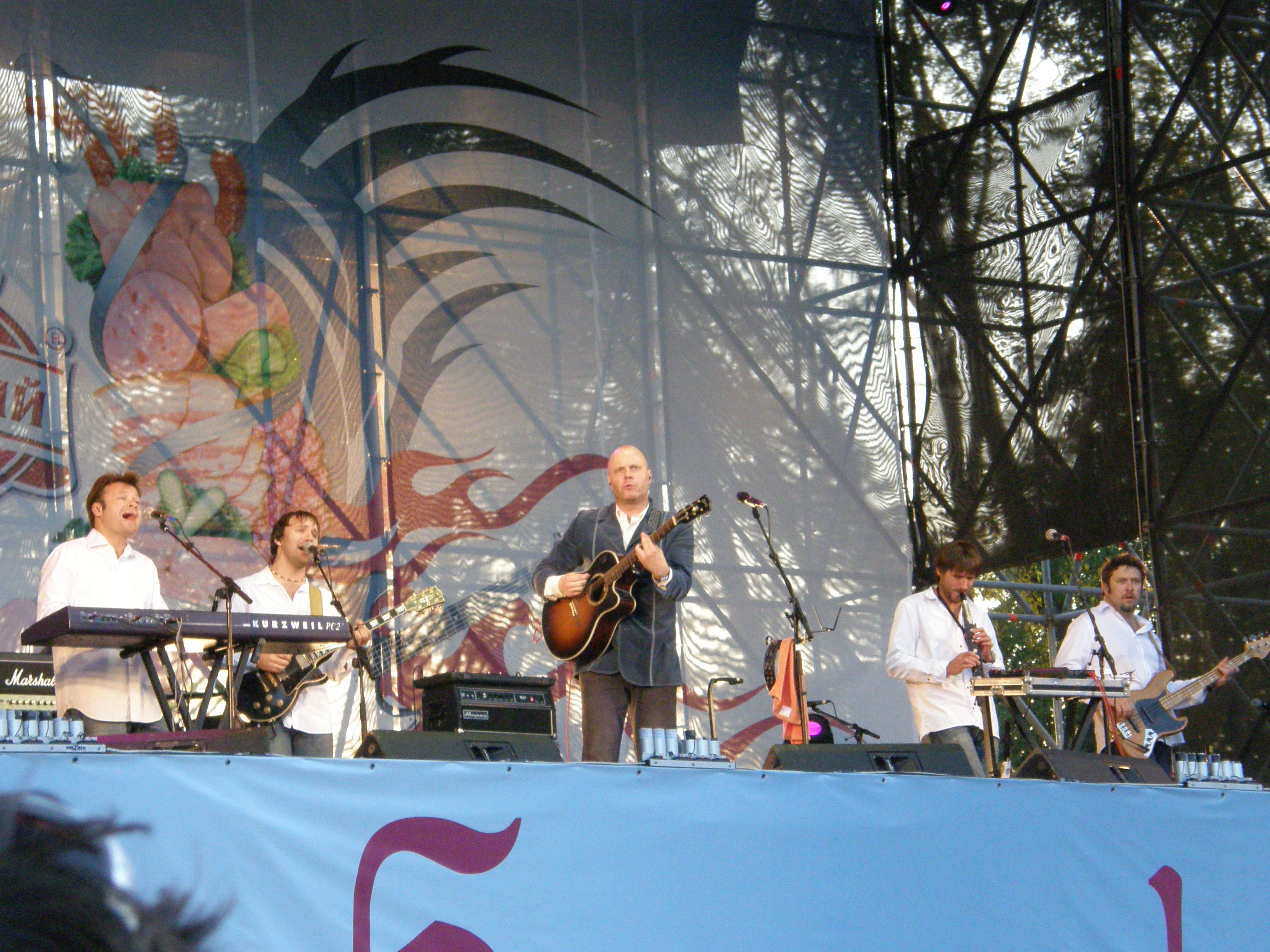 Концерт в парке Щербакова (Донецк) 6 июня 2010 года. Выступление группы «Несчастный случай».